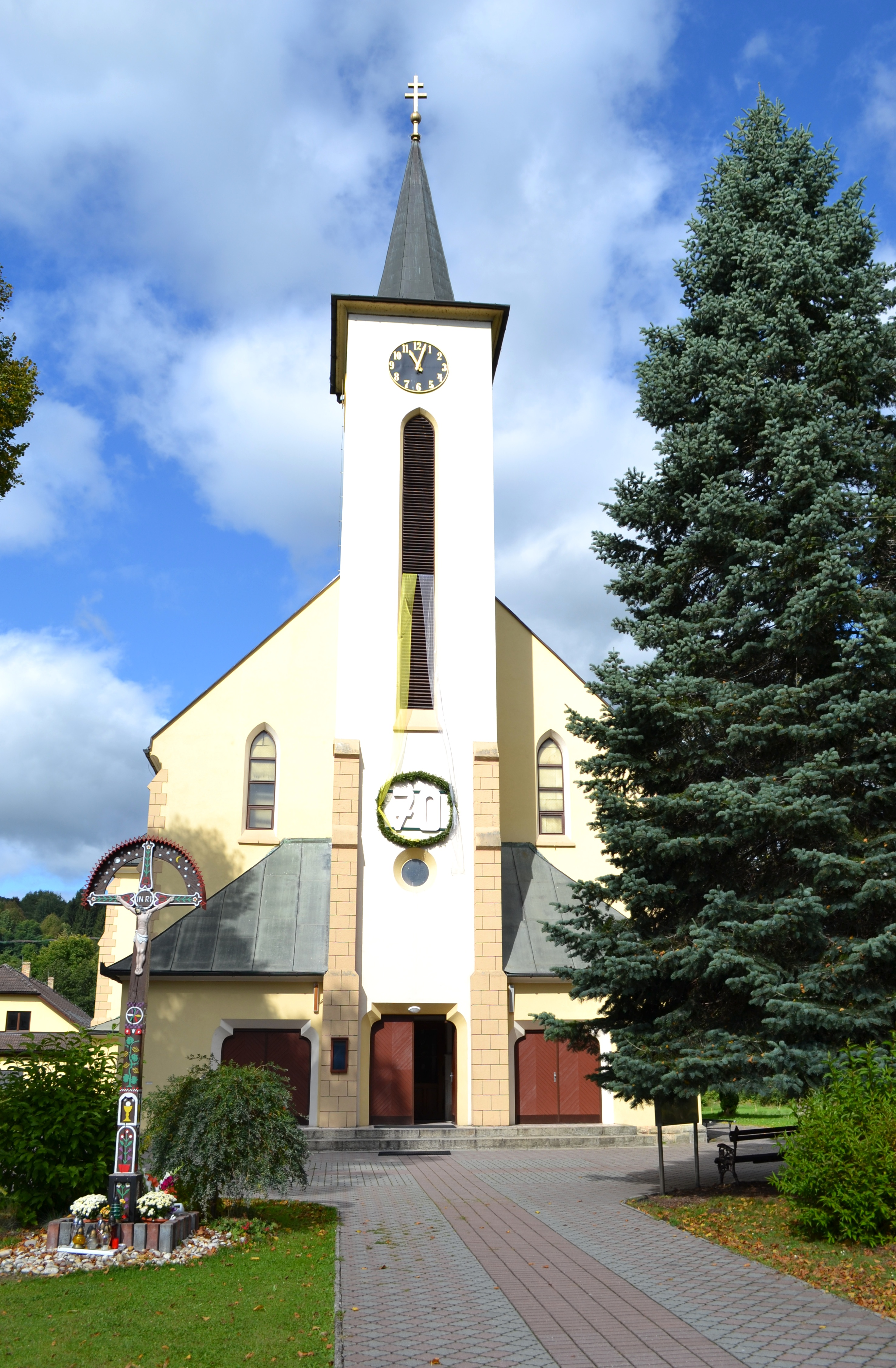 Kostol sv. Petra a Pavla patrí k významným dominantám mesta Hriňová a je zaradený do zoznamu národných kultúrnych pamiatok SR